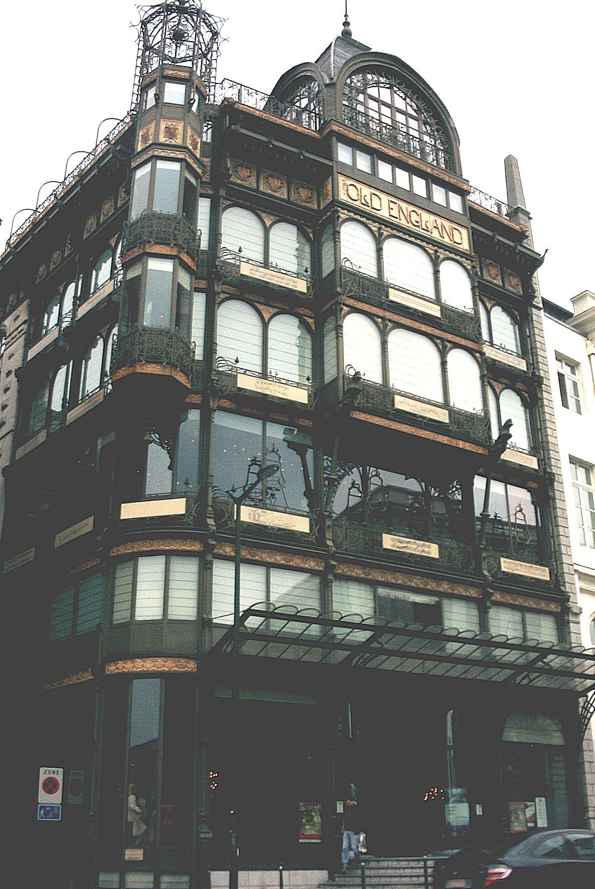 Hangszerek háza, Brüsszel